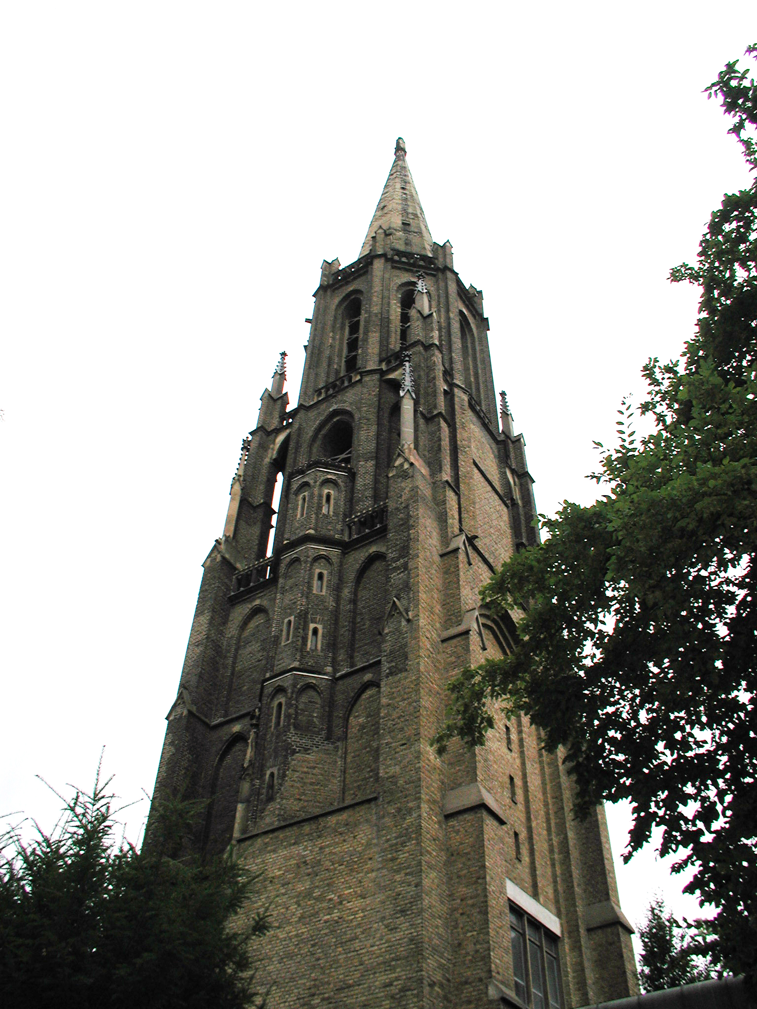 St. Mauritius, Köln.Turm-Südseite